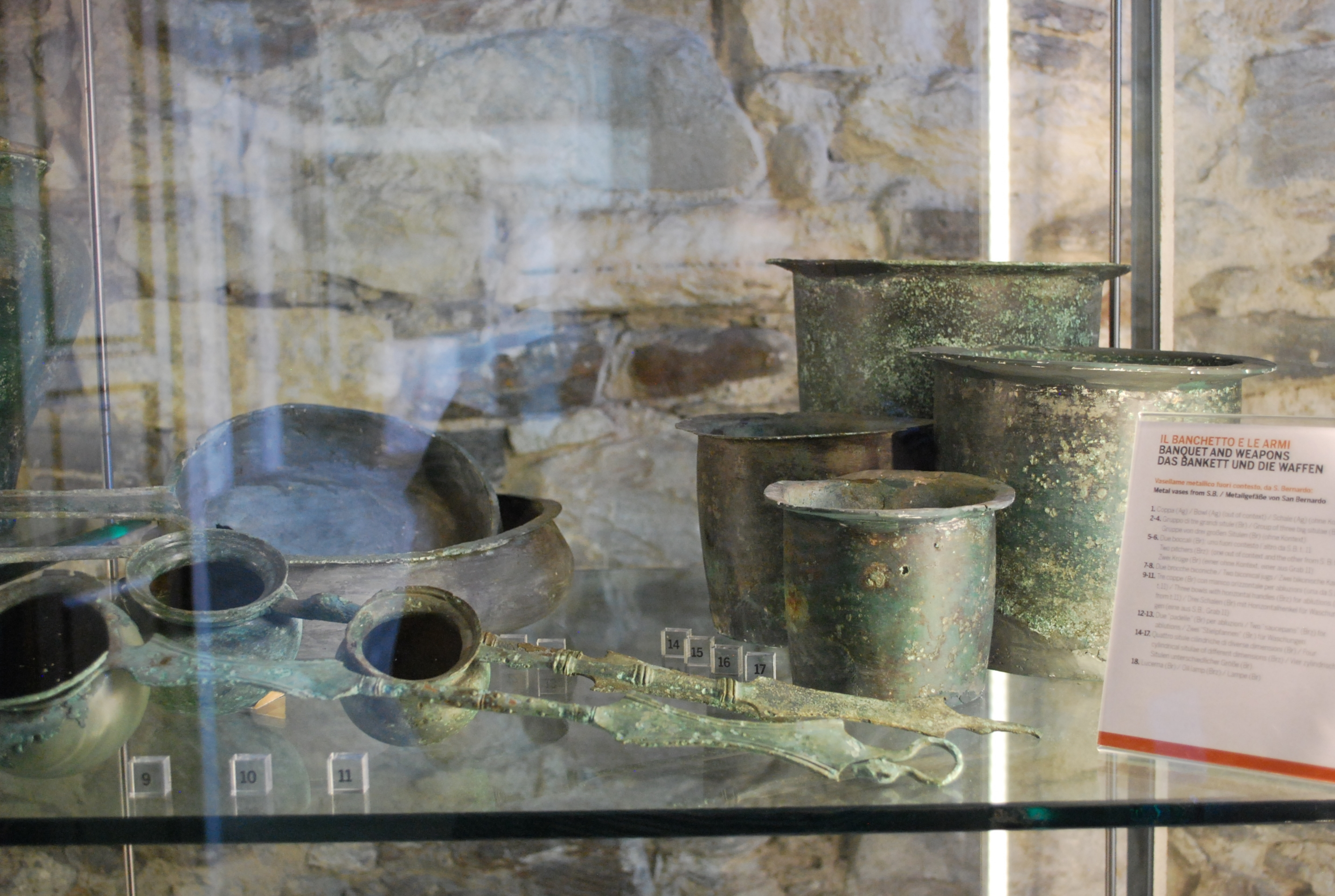 Sala 1, Vetrina 3 ripiano superiore - Sezione archeologica Enrico Bianchetti Ornavasso